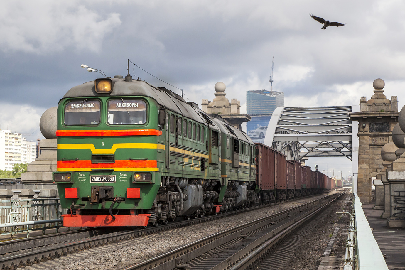 Тепловоз 2М62У-0030 с грузовым поездом. Россия, Москва, перегон Кутузово - Канатчиково, Краснолужский мост